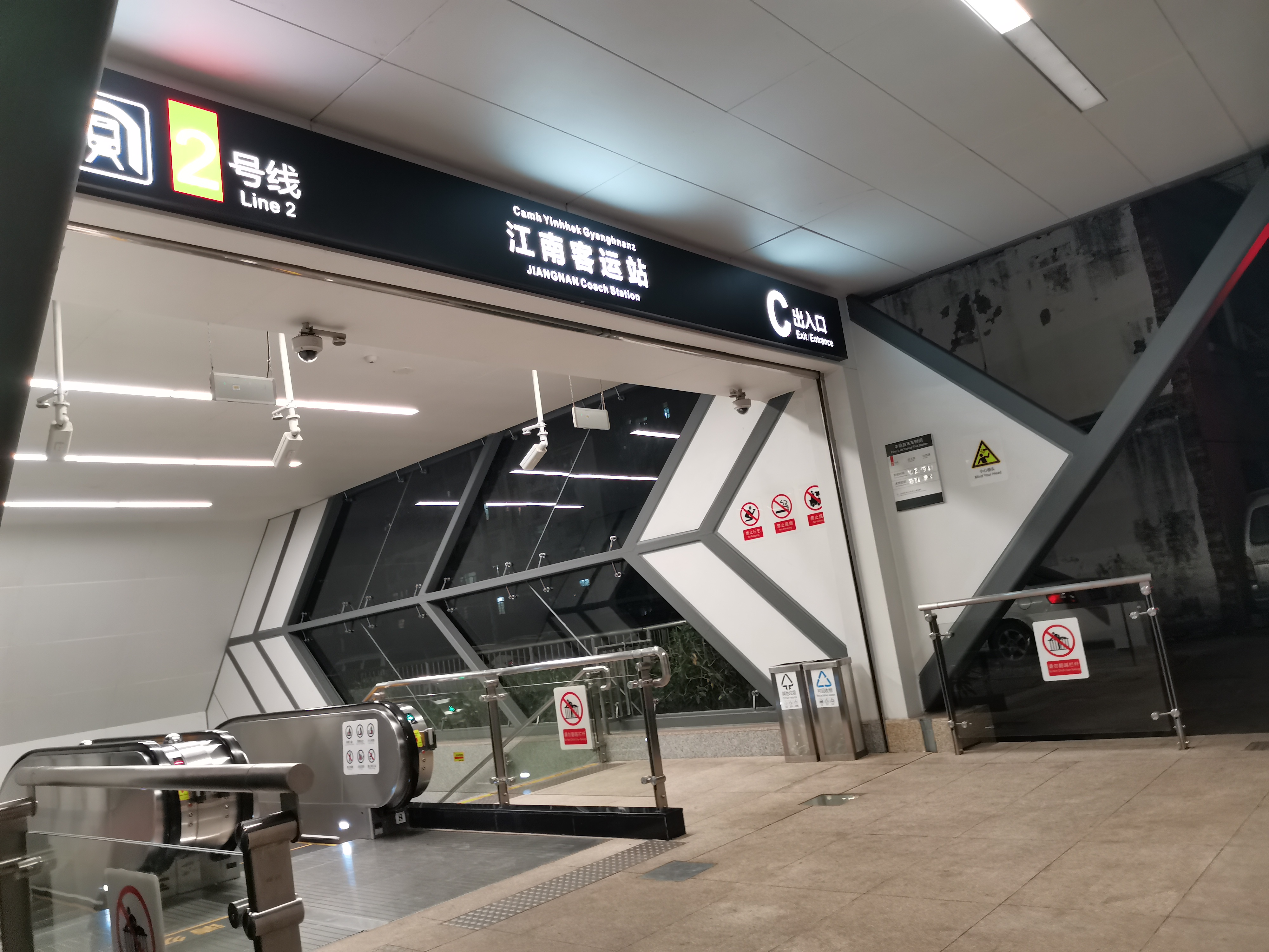 南宁轨道交通2号线江南客运站C出口